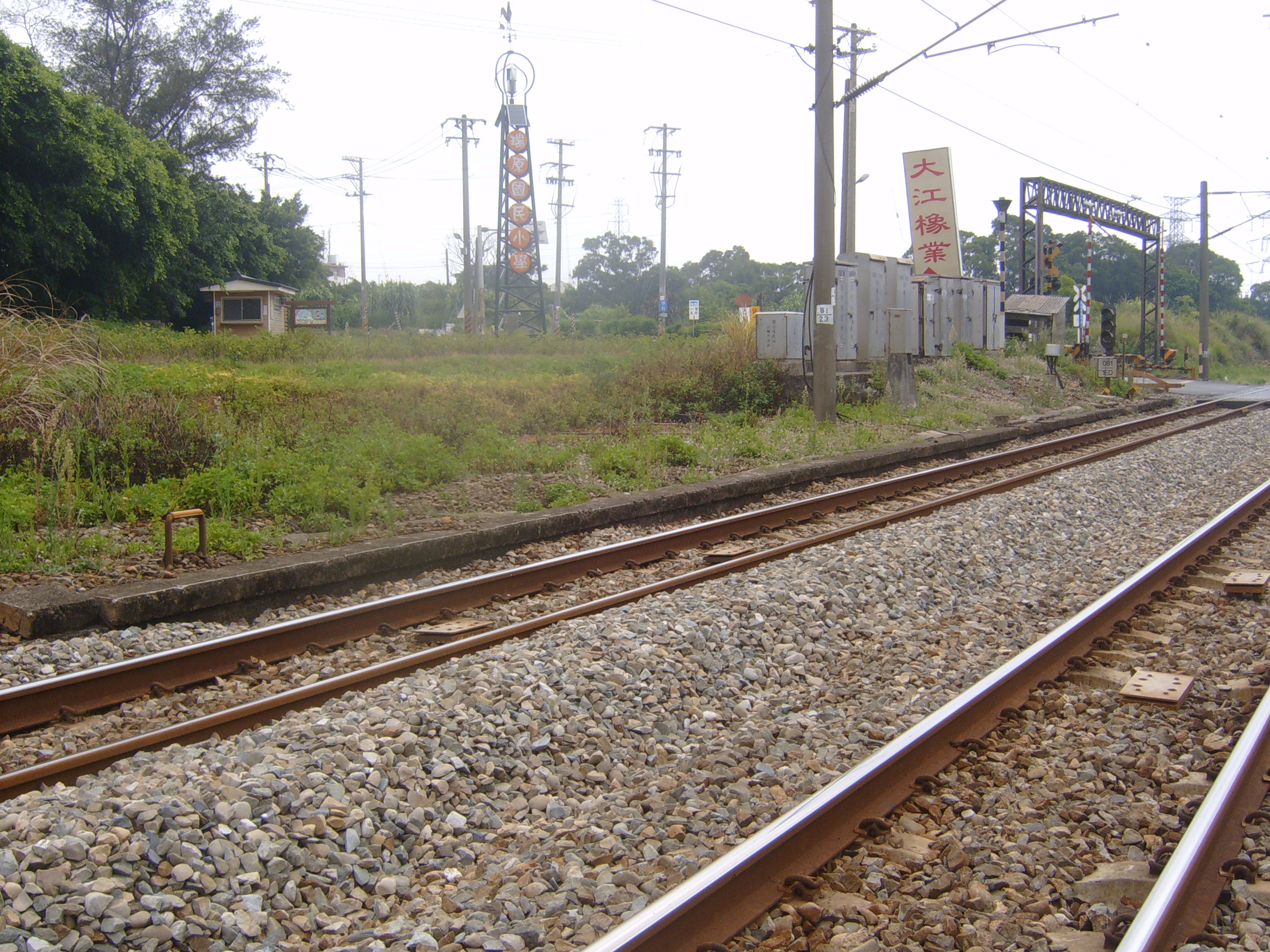 臺鐵三湖站月臺殘跡（楊梅~富岡間）。